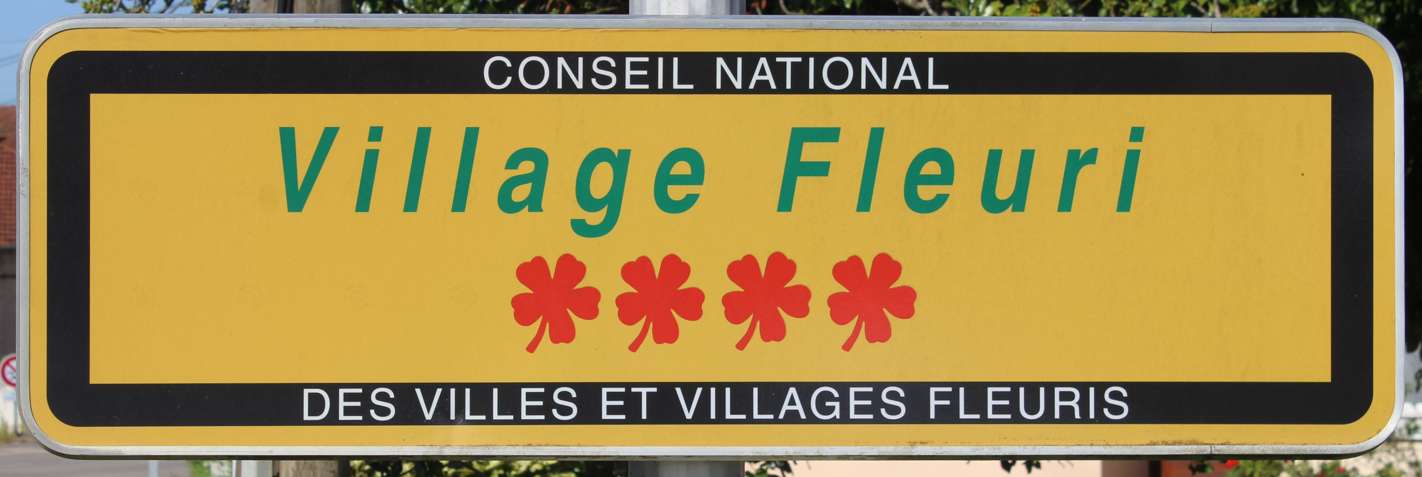 Panneau village fleuri à Vonnas.